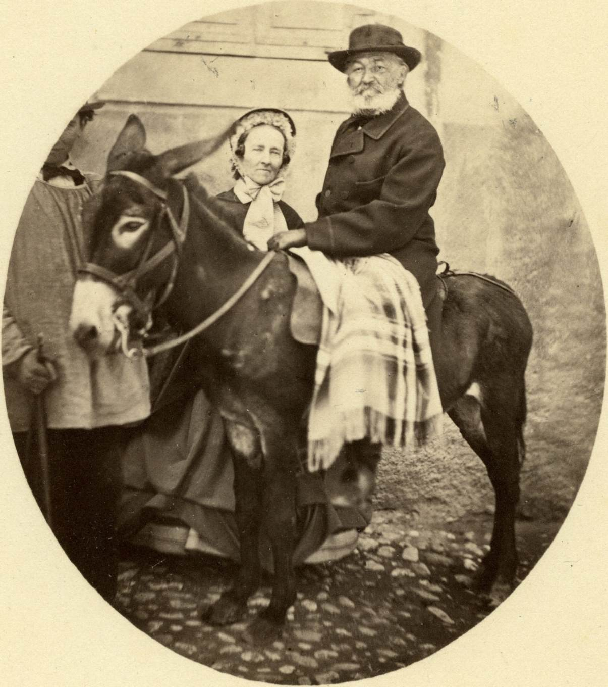 Koigi, Prandi ja Laimetsa mõisnik Otto Magnus von Grünewaldt oma abikaasa Mariega.